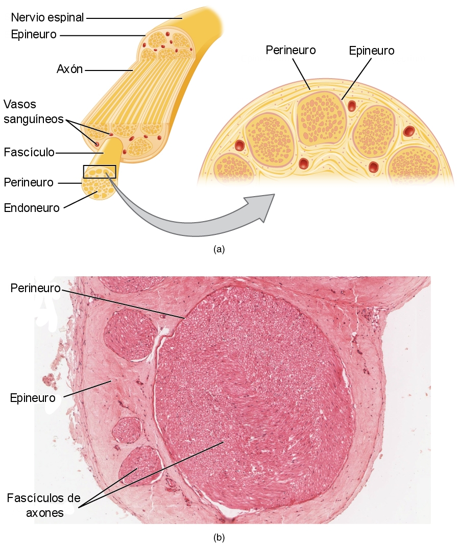 En a se representa un esquema de un nervio espinal con los fascículos de axones, endoneuro, epineuro y perineuro. En b una imagen microscópica de una sección de nervio.